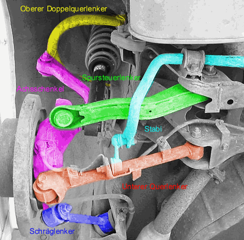 Mehrlenkerachse mit 3 unteren und einem oberen Dreieckslenker